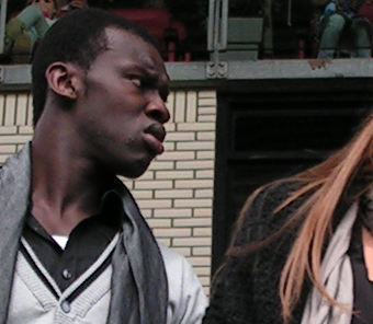 Noors voetballer van Gambiaanse afkomst Pa-Modou Kah in het Utrechtse Stadion Galgenwaard.